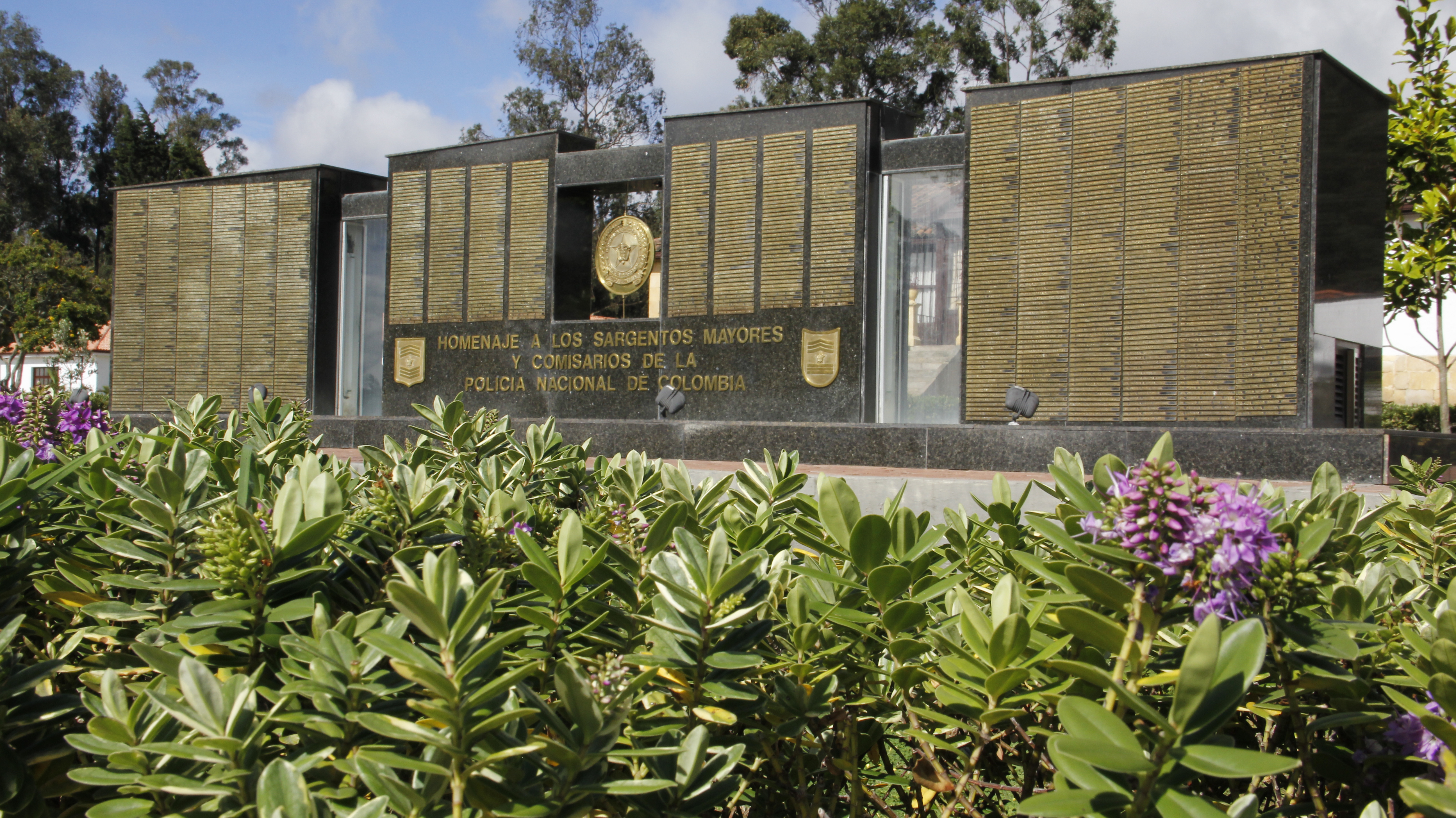 Monumento